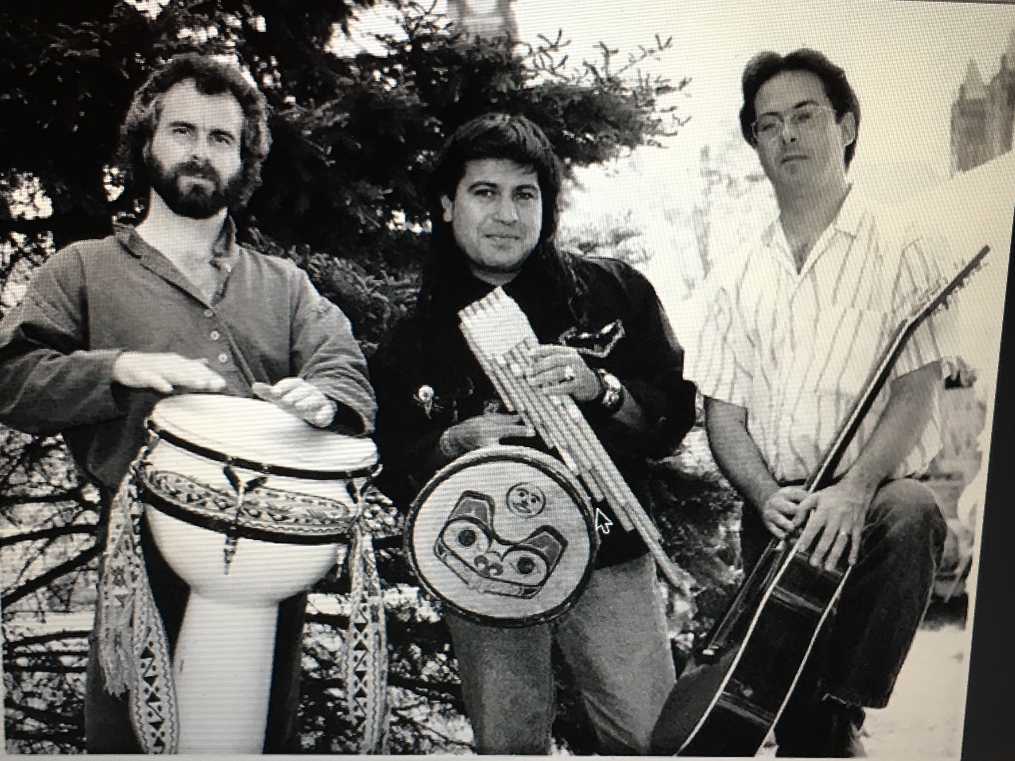 Domingues Dario mit Mitgliedern seiner Gruppe Tupac Amaru 1987 für das Album Awaking in Rhythms